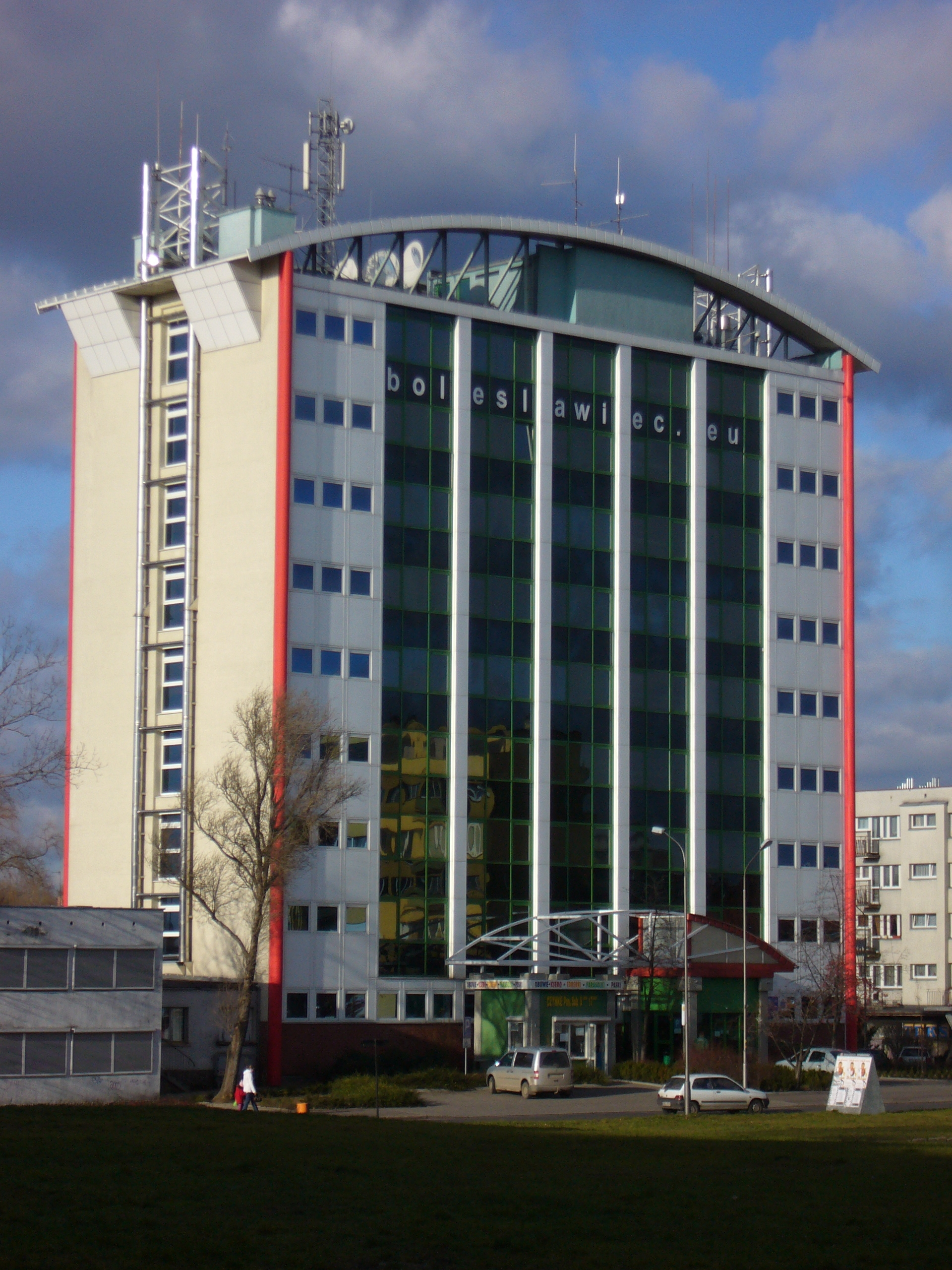 Bolesławiec - "biurowiec", siedziba władz administracji państwowej i samorządowej